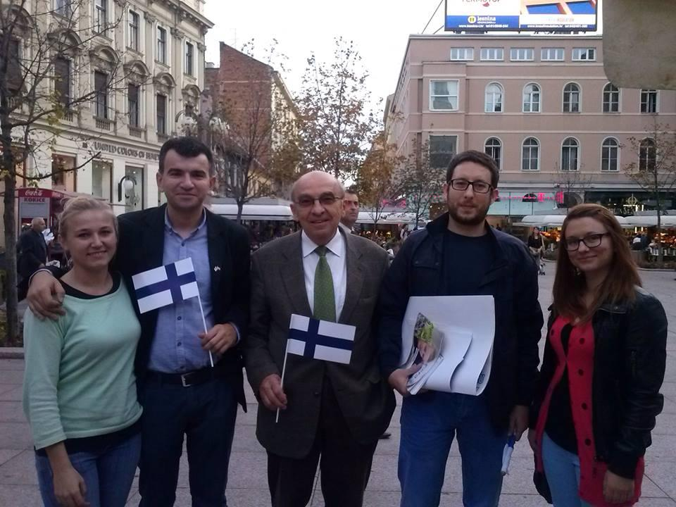 Srpskohrvatski / српскохрватски: Članovi Foruma mladih SDF-a i Srpskog demokratskog foruma u tijeku akcije na Cvjetnom trgu u Zagrebu.